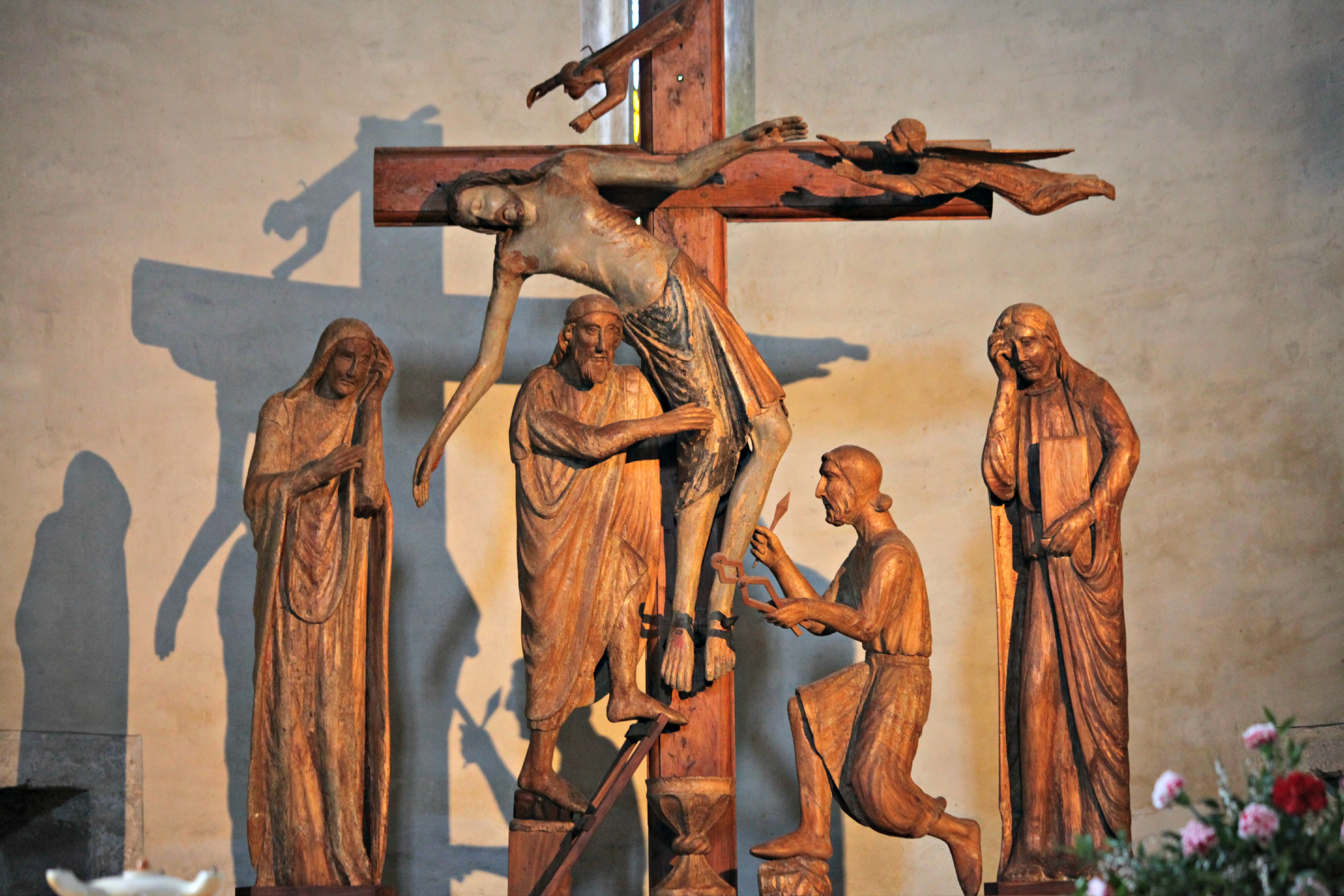 Deposizione dalla croce, inizio XIII secolo, Pieve di Santa Maria, Vicopisano